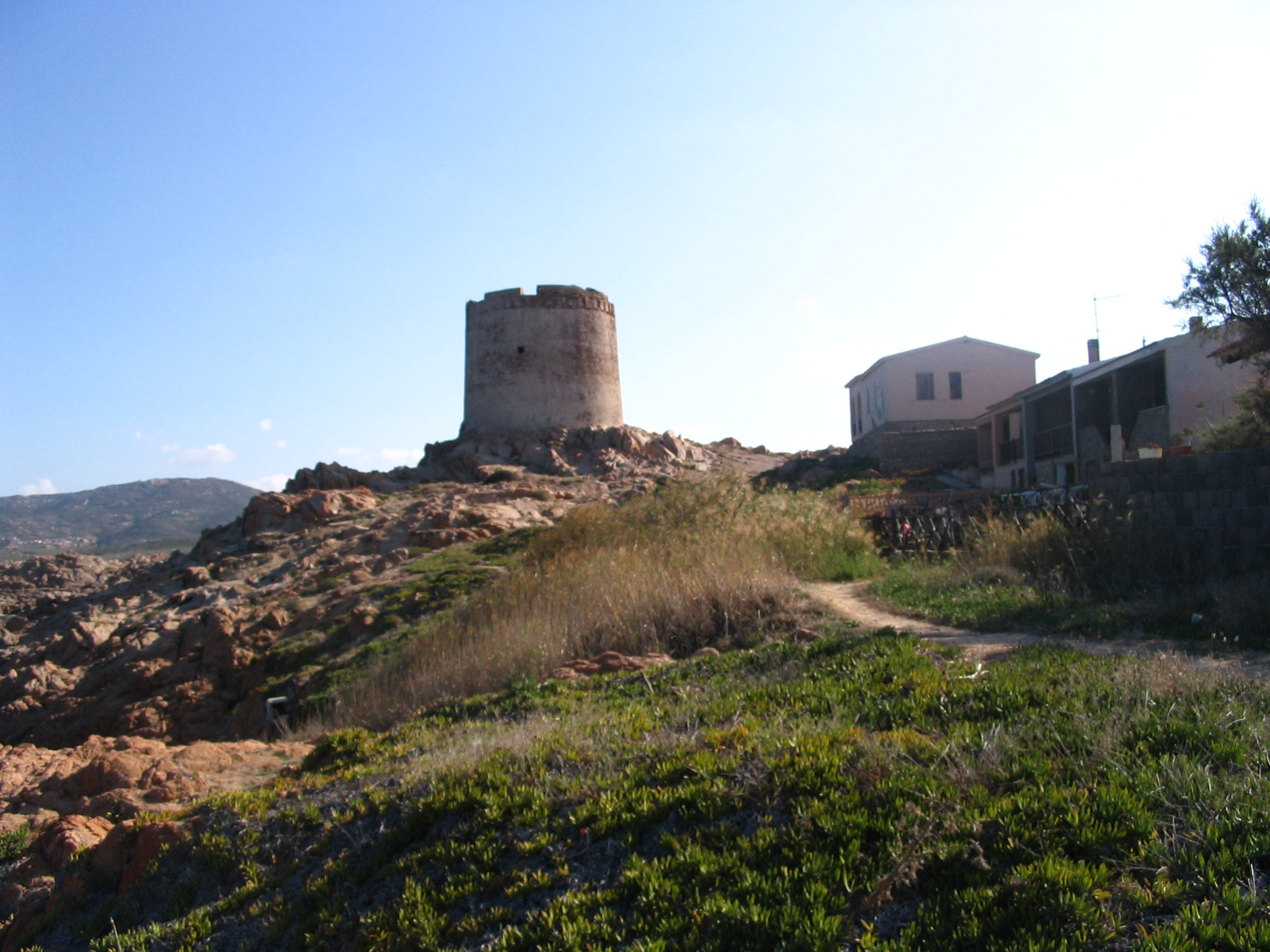 La torre spagnola nel villaggio di Isola Rossa in Sardegna